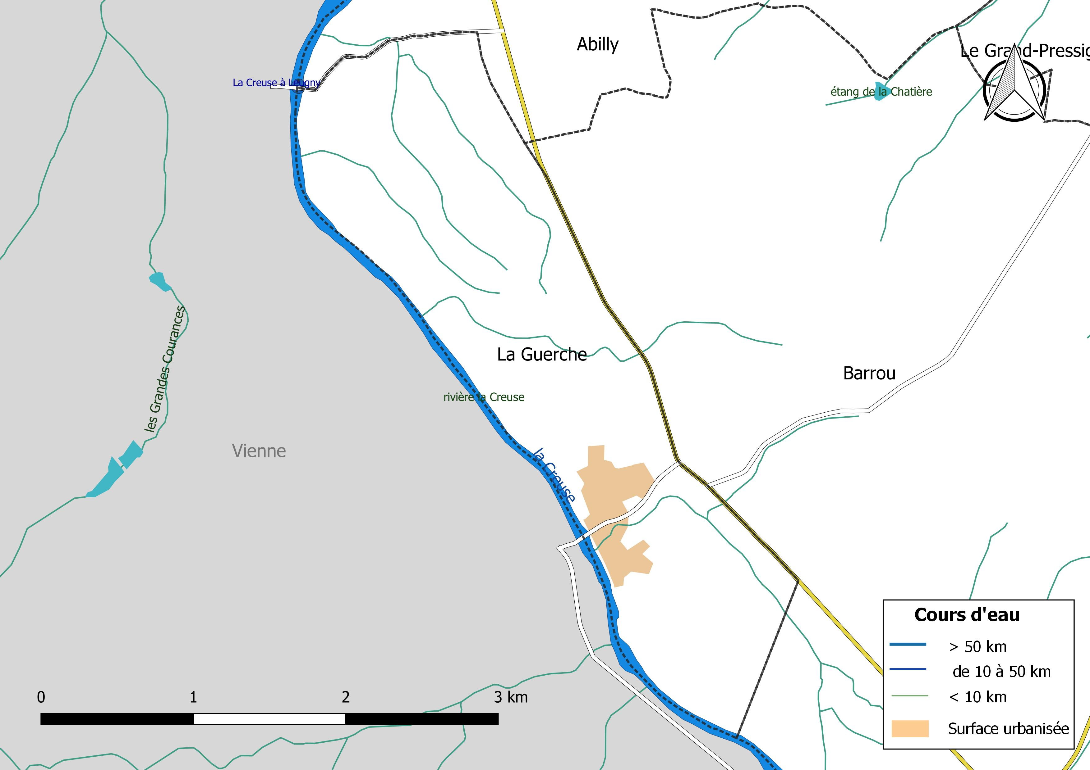 Carte du réseau hydrographique de la commune de La Guerche (France).